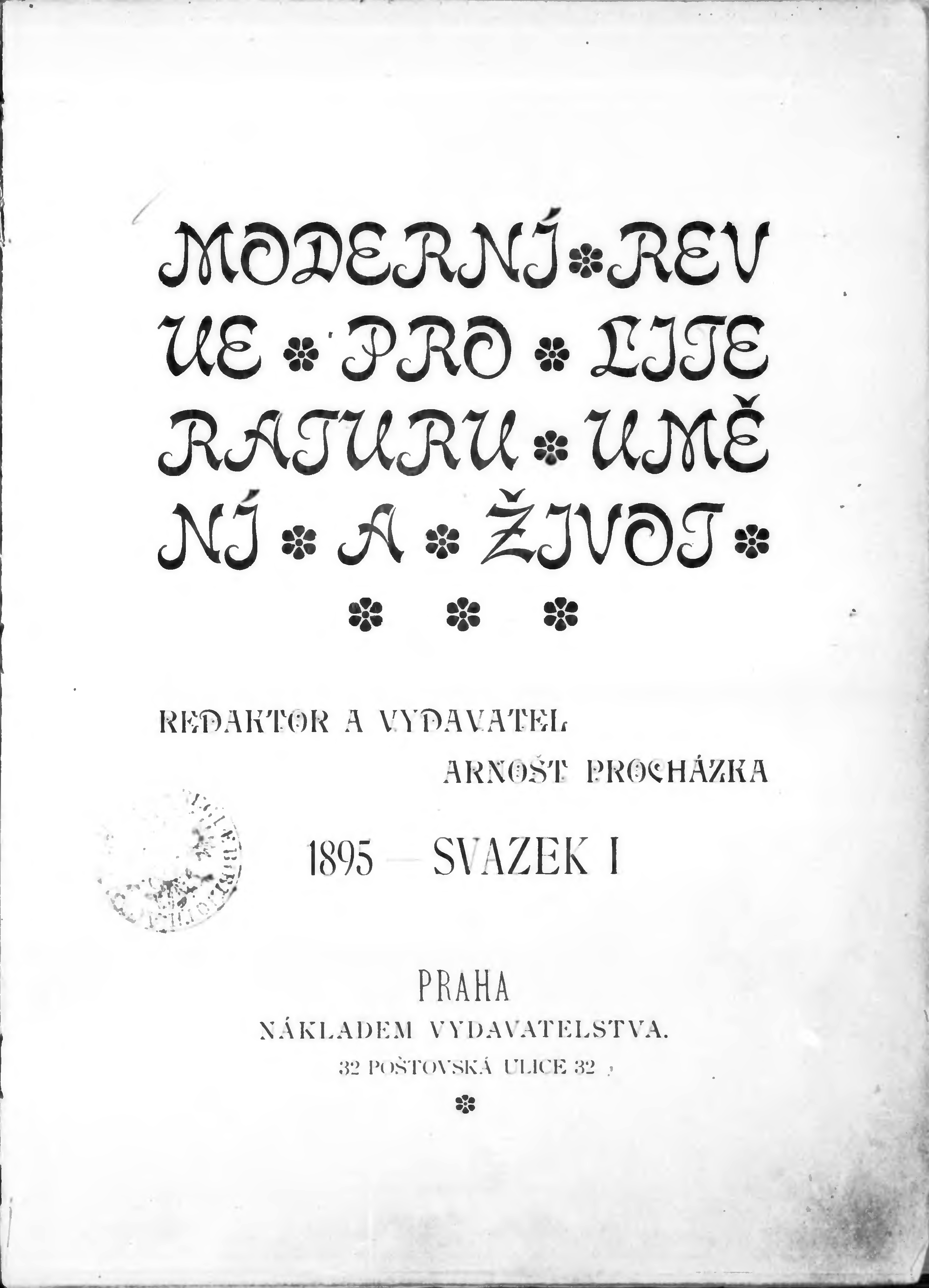 Moderní revue, titulní stránka prvního výtisku (1/1885)